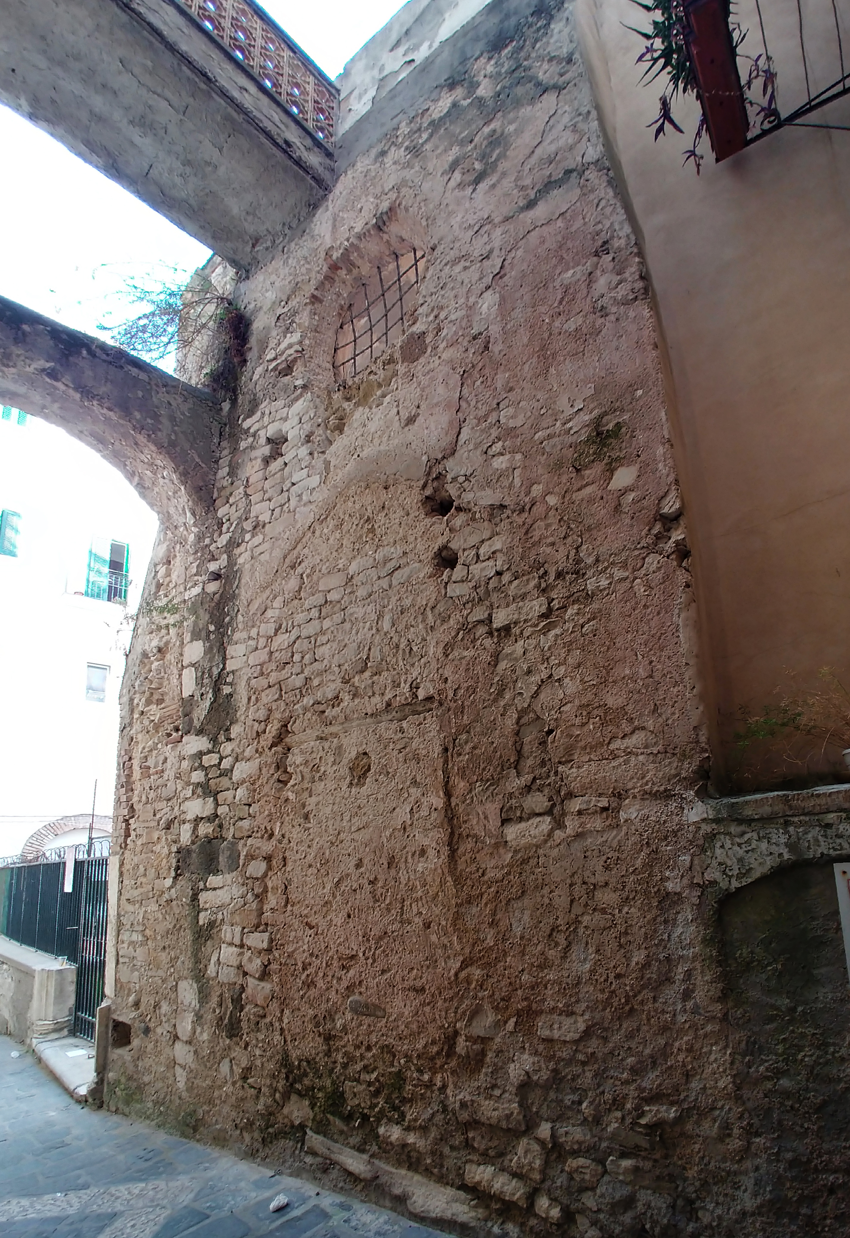 Facciata originaria.